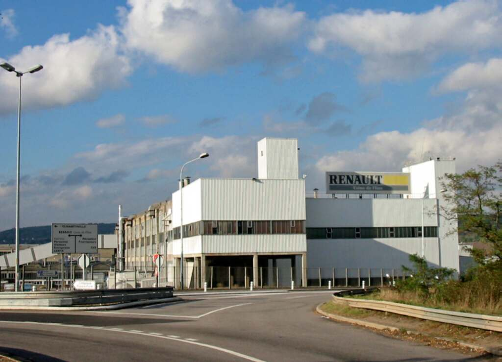 Aubergenville (Yvelines), vue des usines Renault Photo JH Mora, octobre 2005 Catégorie:Image d'Aubergenville